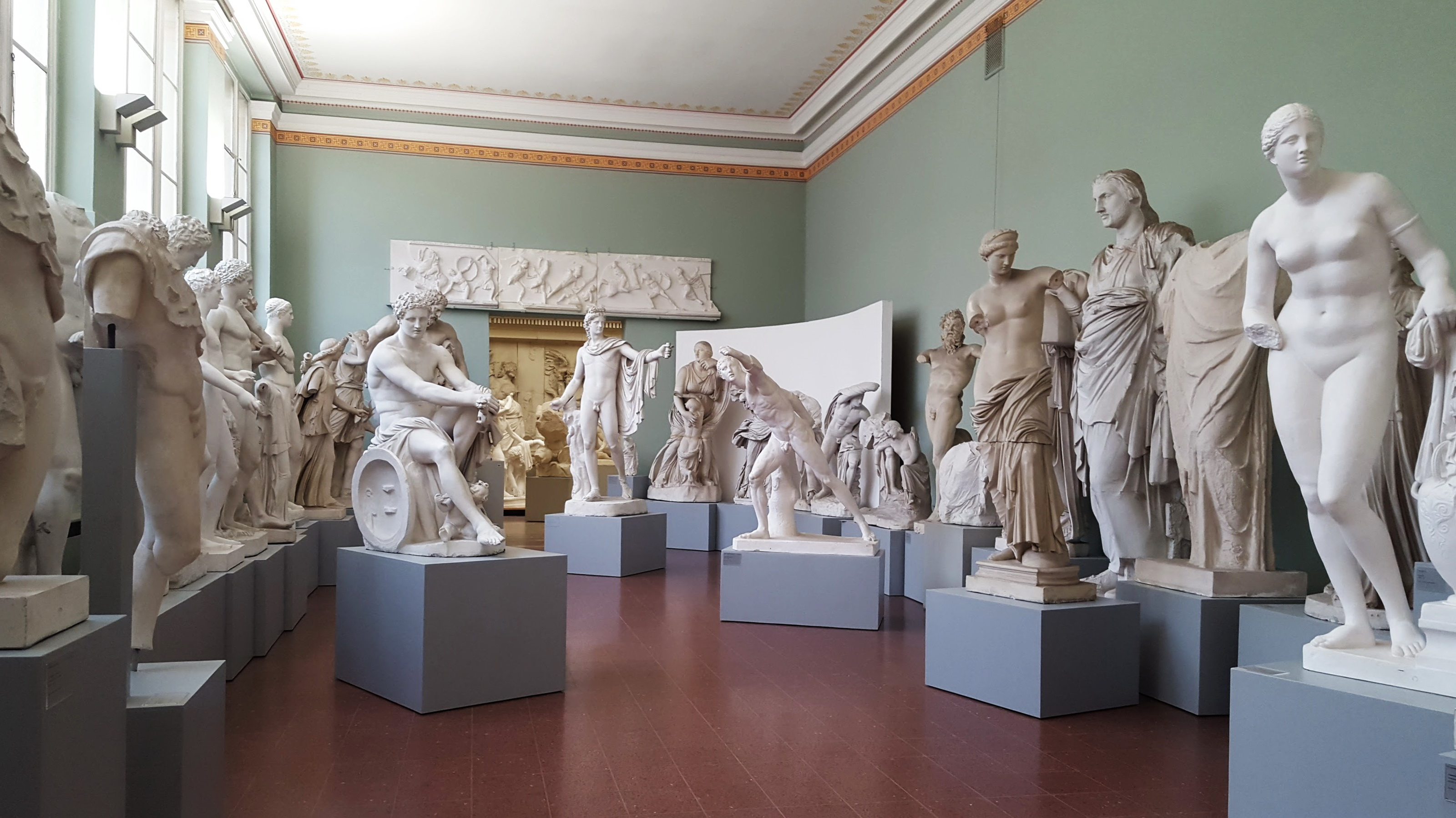 Das Akademische Kunstmuseum ist das älteste Bonner Museum. Es beherbergt die Antikensammlung der Universität Bonn mit über 500 Abgüssen antiker Statuen und Reliefs und über 2000 Originalen. Es befindet sich in einem klassizistischen Bau am südlichen Ende des Hofgartens direkt gegenüber dem Kurfürstlichen Schloss. (Blick in die Sammlung)